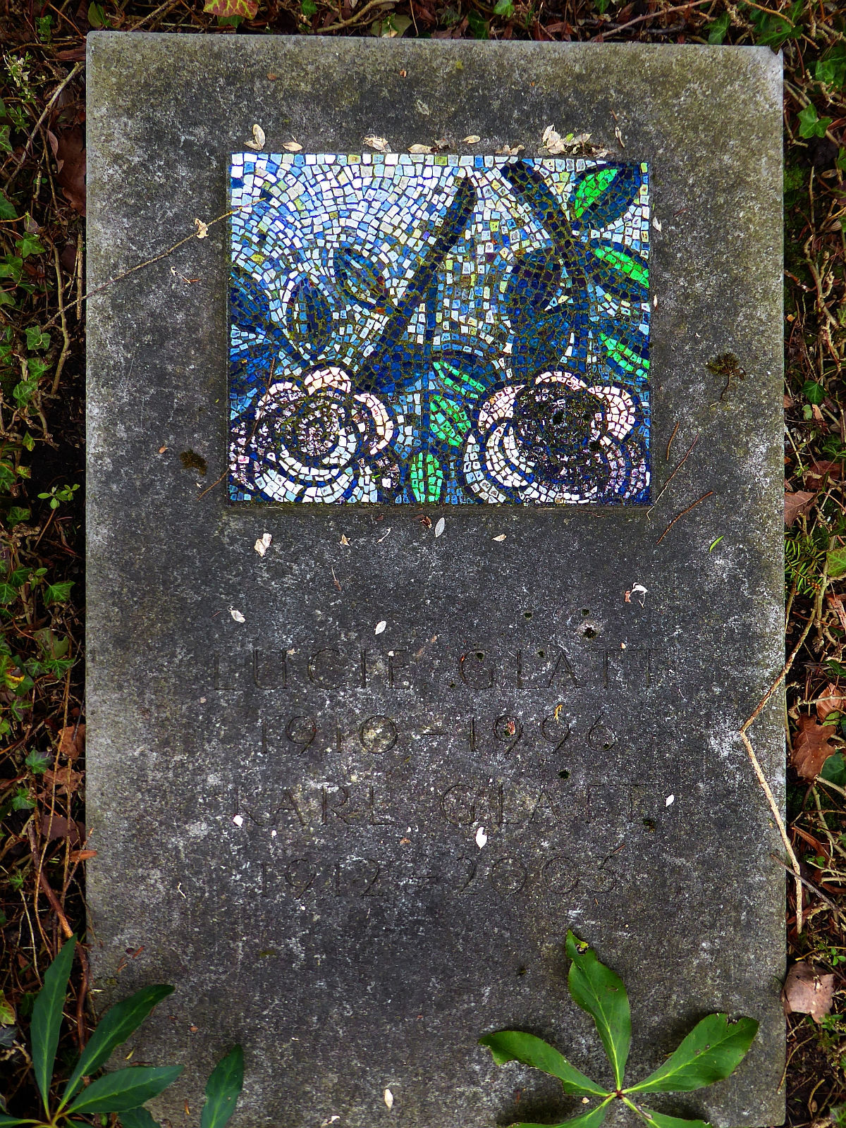 Karl Glatt-Notz (1912–2003), Kunstmaler, Landschaftsmaler, Wandbilder, Mitbegründer des Keis 48, Basler Graumaler, Lucie Glatt (1910–1996) Grab auf dem Friedhof Hörnli, Riehen, Basel-Stadt